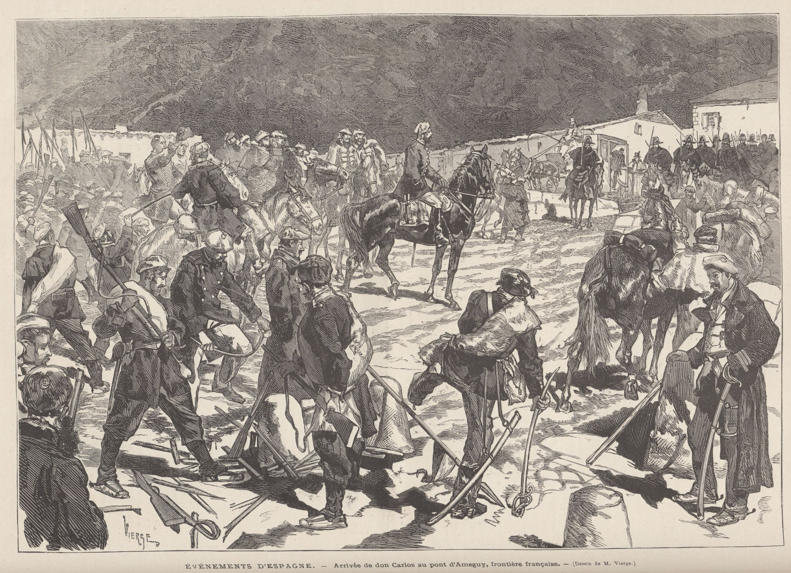 Événements d'Espagne. — Arrivée de don Carlos au pont d'Ameguy, frontière française. — (Dessin de M. Vierge)